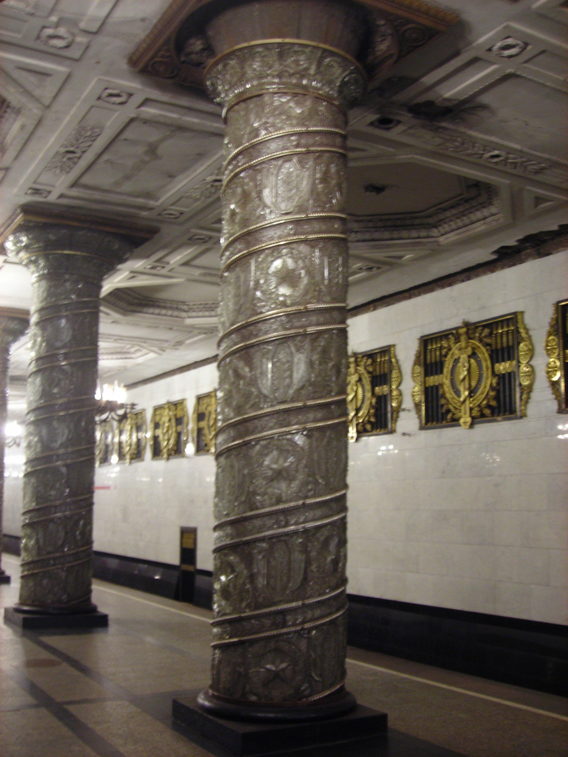 Колонны и путевая стена станции метро «Автово» в Санкт-Петербурге